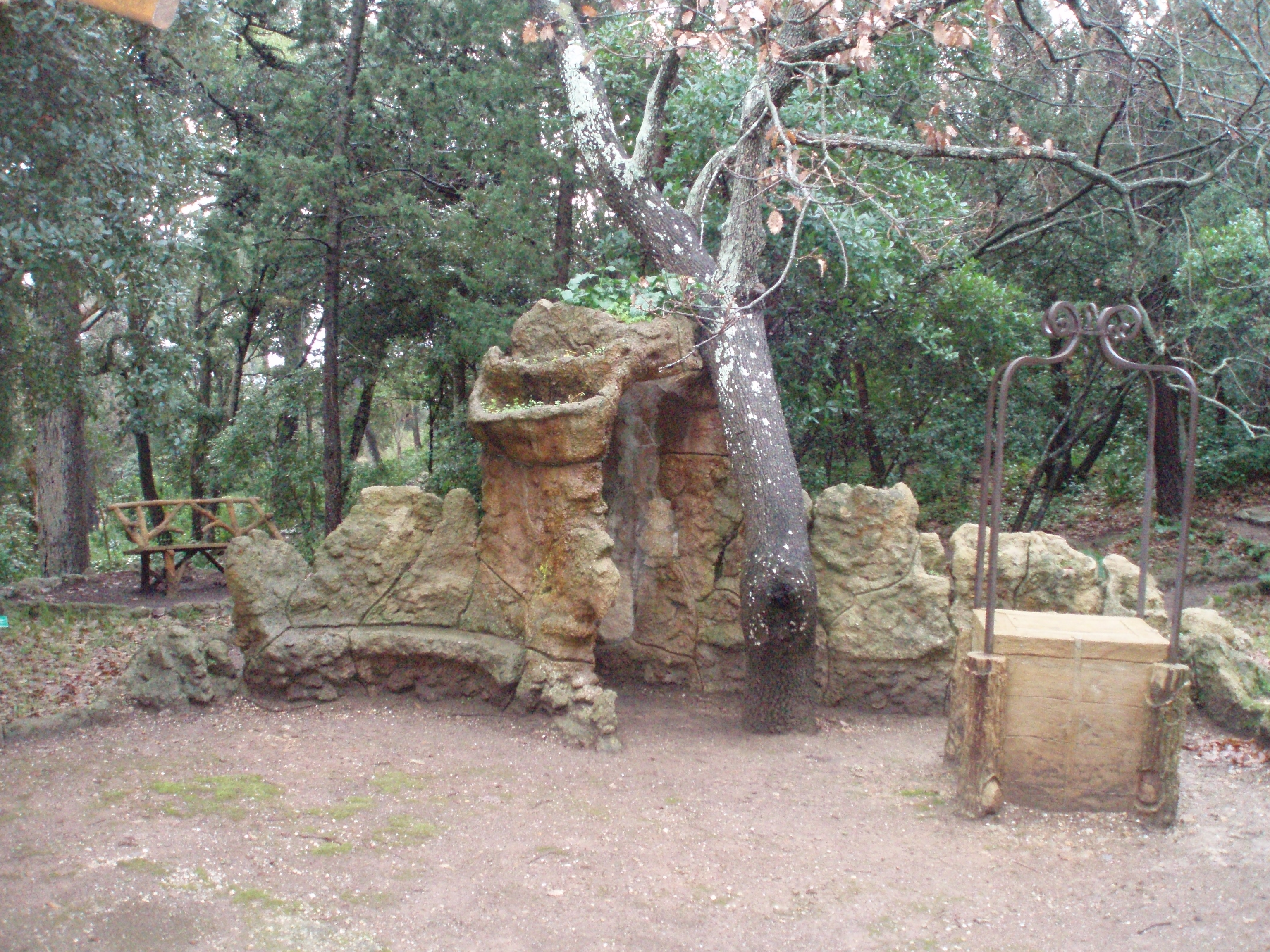 Le Plantier de Costebelle